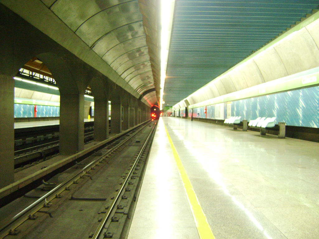 Vista Geral da Estação das Clínicas do Metrô